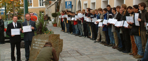 Bürgermeister Gerhard Skiba, Andreas Maislinger (Gründer des Vereins Österreichischer Auslandsdienst) und Gedenkdiener stehen anlässlich der der 11. Braunauer Zeitgeschichte-Tage „Wenige Gerechte?“ in Braunau am Inn (Österreich) vor dem Geburtshaus von Adolf Hitler und halten die Namen der österreichischen Gerechten unter den Völkern (Menschen, die Juden während des Holocausts gerettet haben) in den Händen.